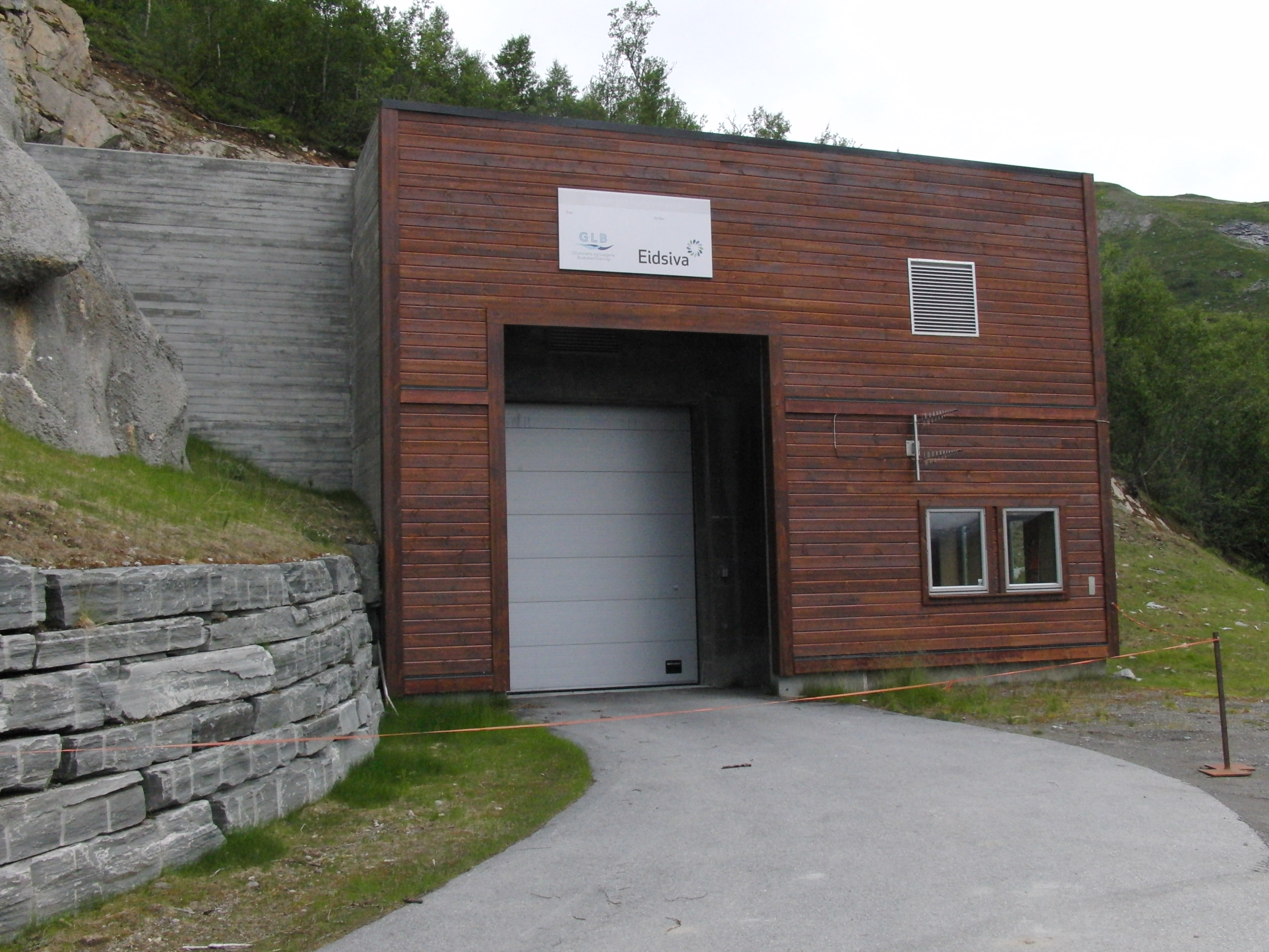 Rauberget pumpestasjon